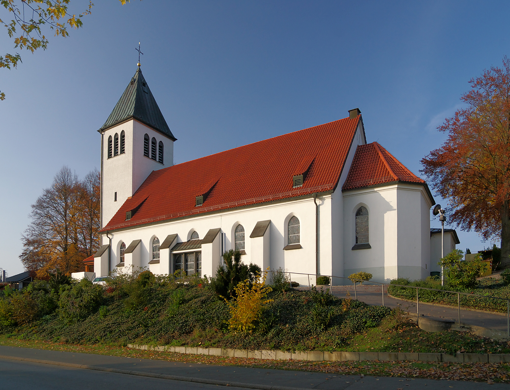 Katholische Kirche Christ-König in Fröndenberg-Warmen, Nordrhein-Westfalen, Deutschland.